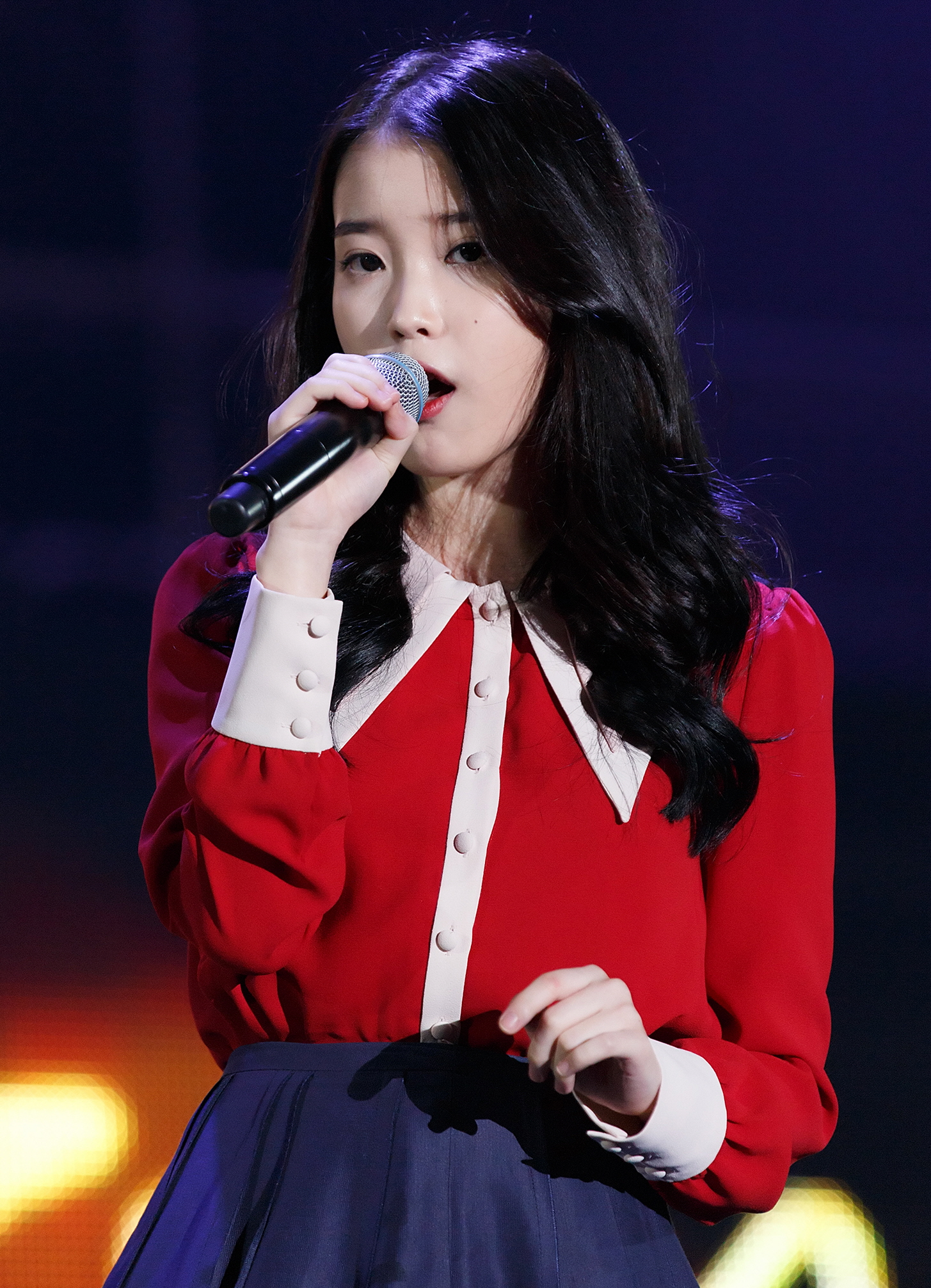 [직찍] 14.10.17 롯데카드 Moov in 인천 아이유